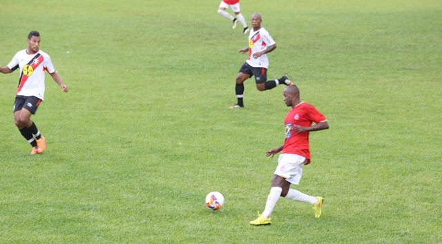 Reinaldo, na partida entre Inter de Lages e Joinville, pelo campeonato catarinense de 2015